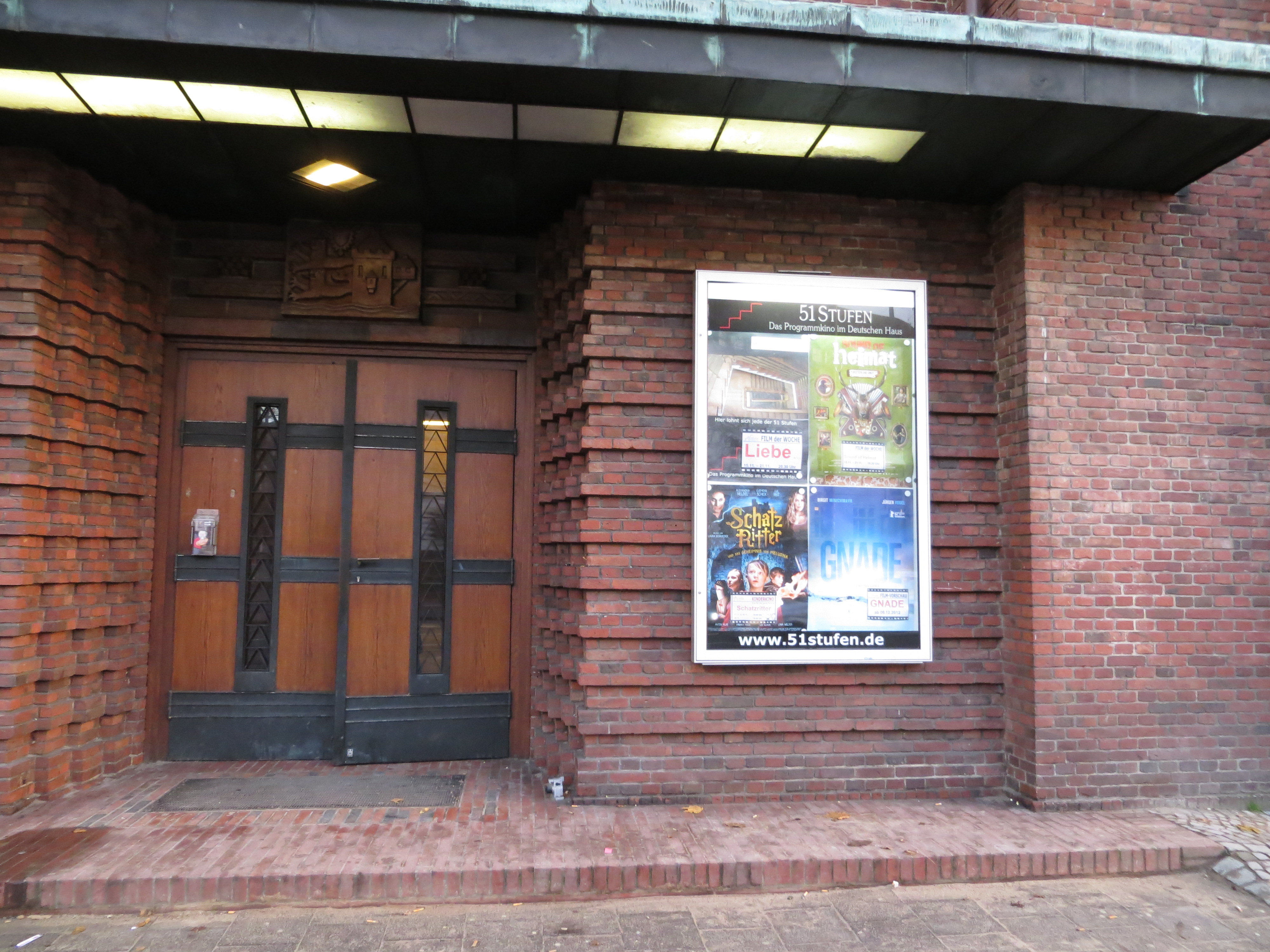 Eingang zum 51 Stufen Kino im Deutschen Haus, Flensburg 2013; mit Flensburg-Wappen über der Tür